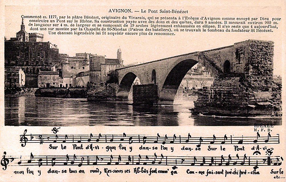 Le pont d'Avignon et sa chanson